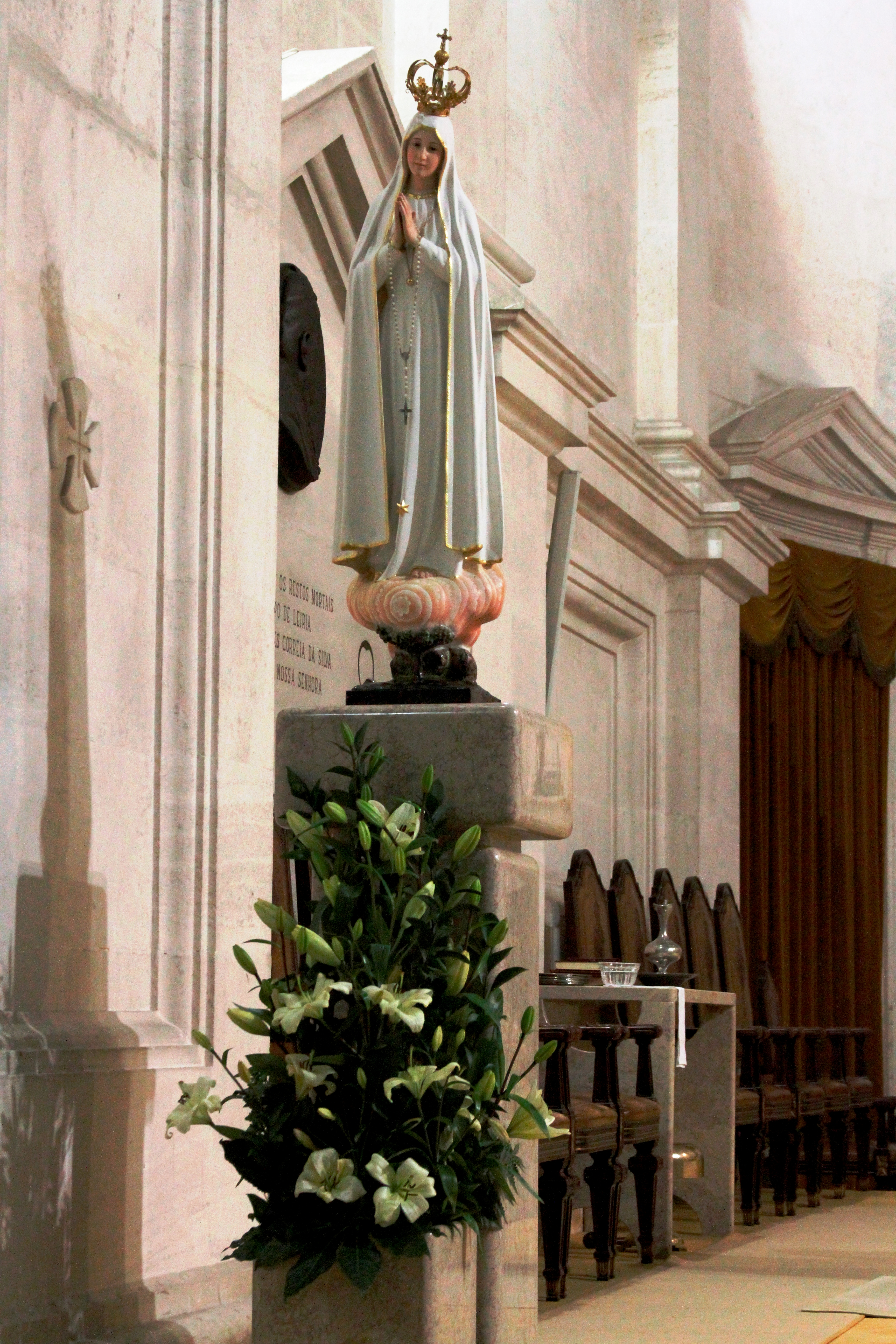 Nossa Senhora de Fátima